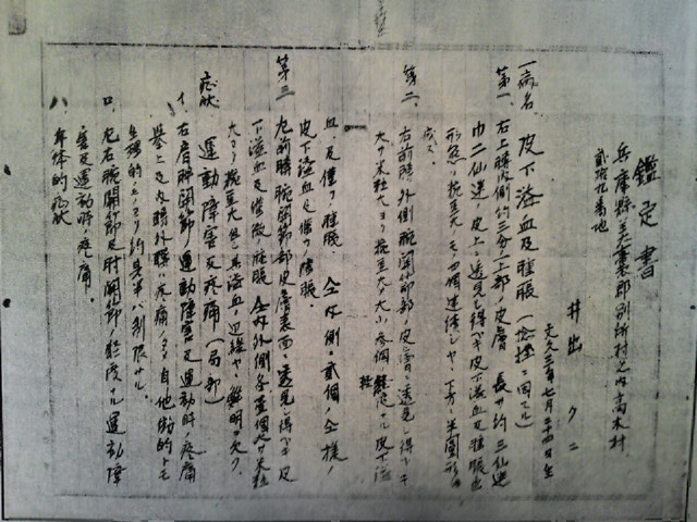 天理教診断書